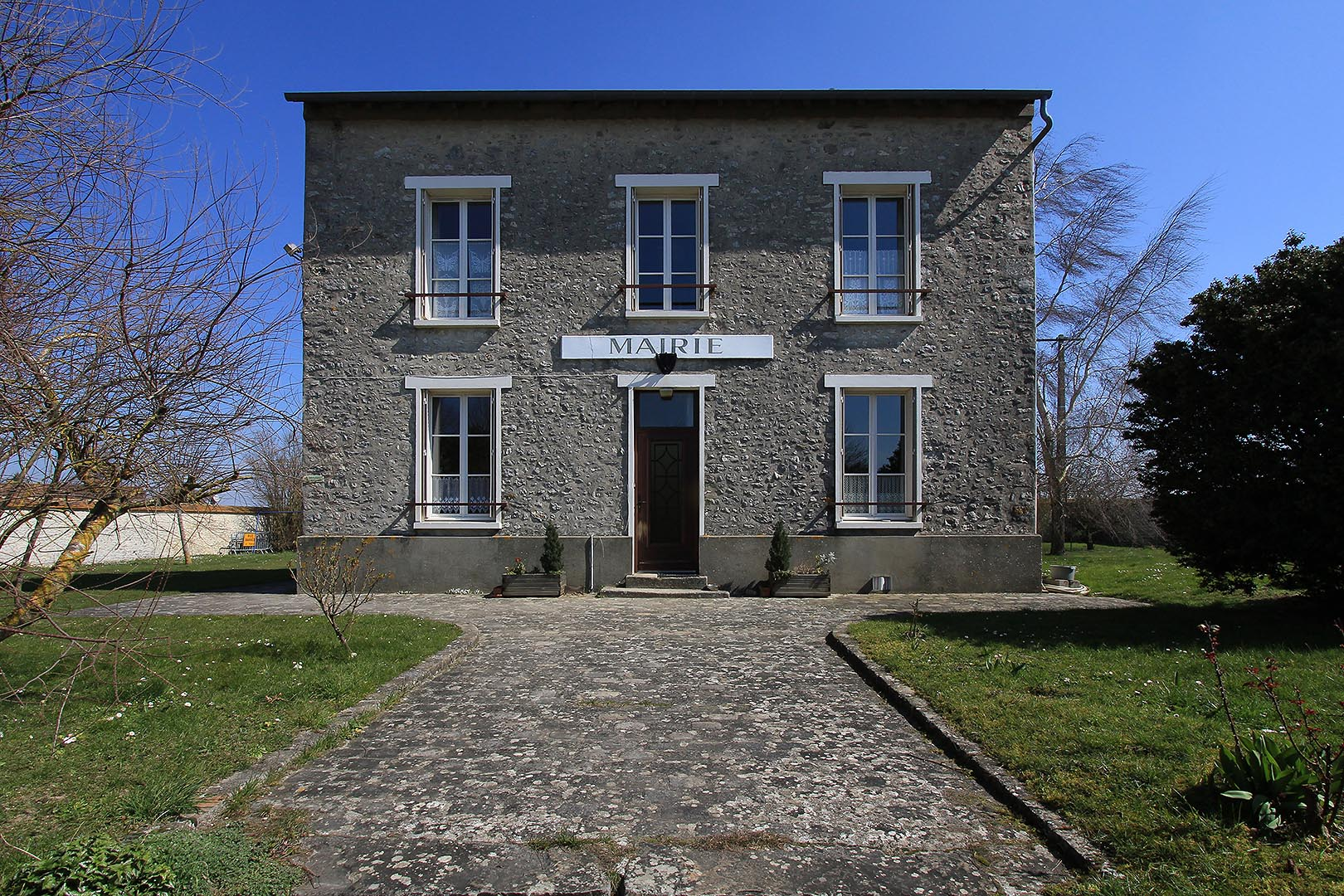 mairie de Roinvilliers